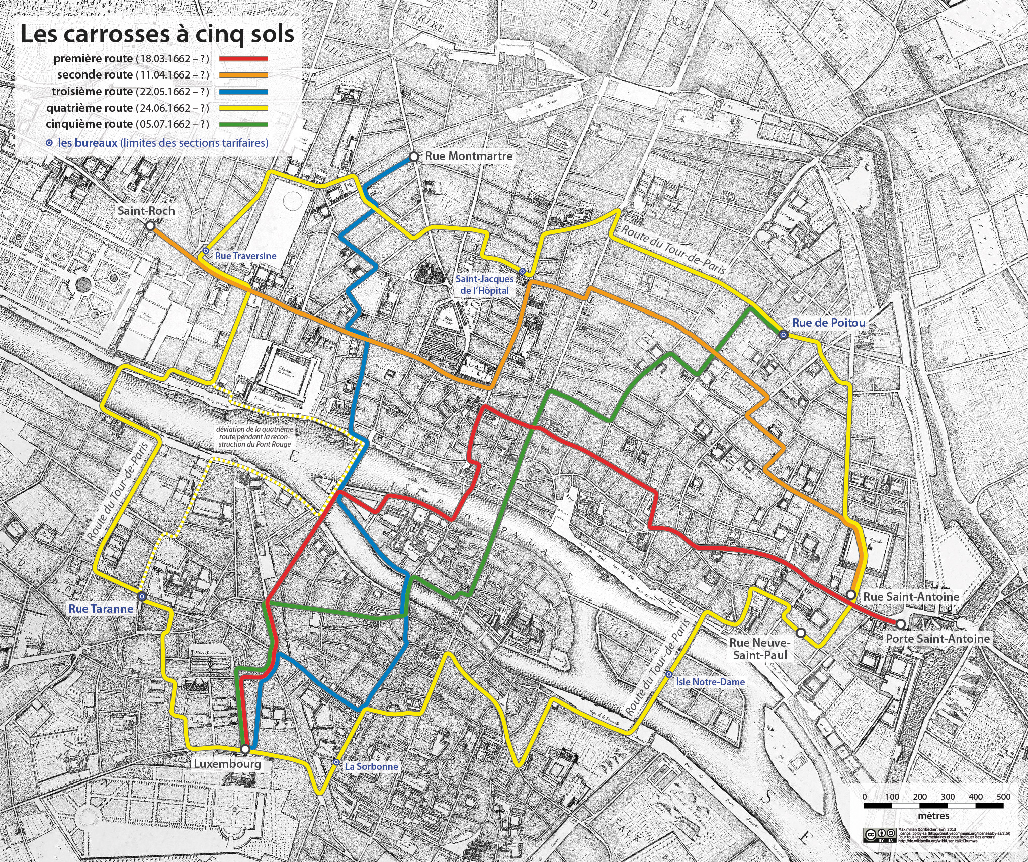 Die Linienführungen der carrosses à cinq sols